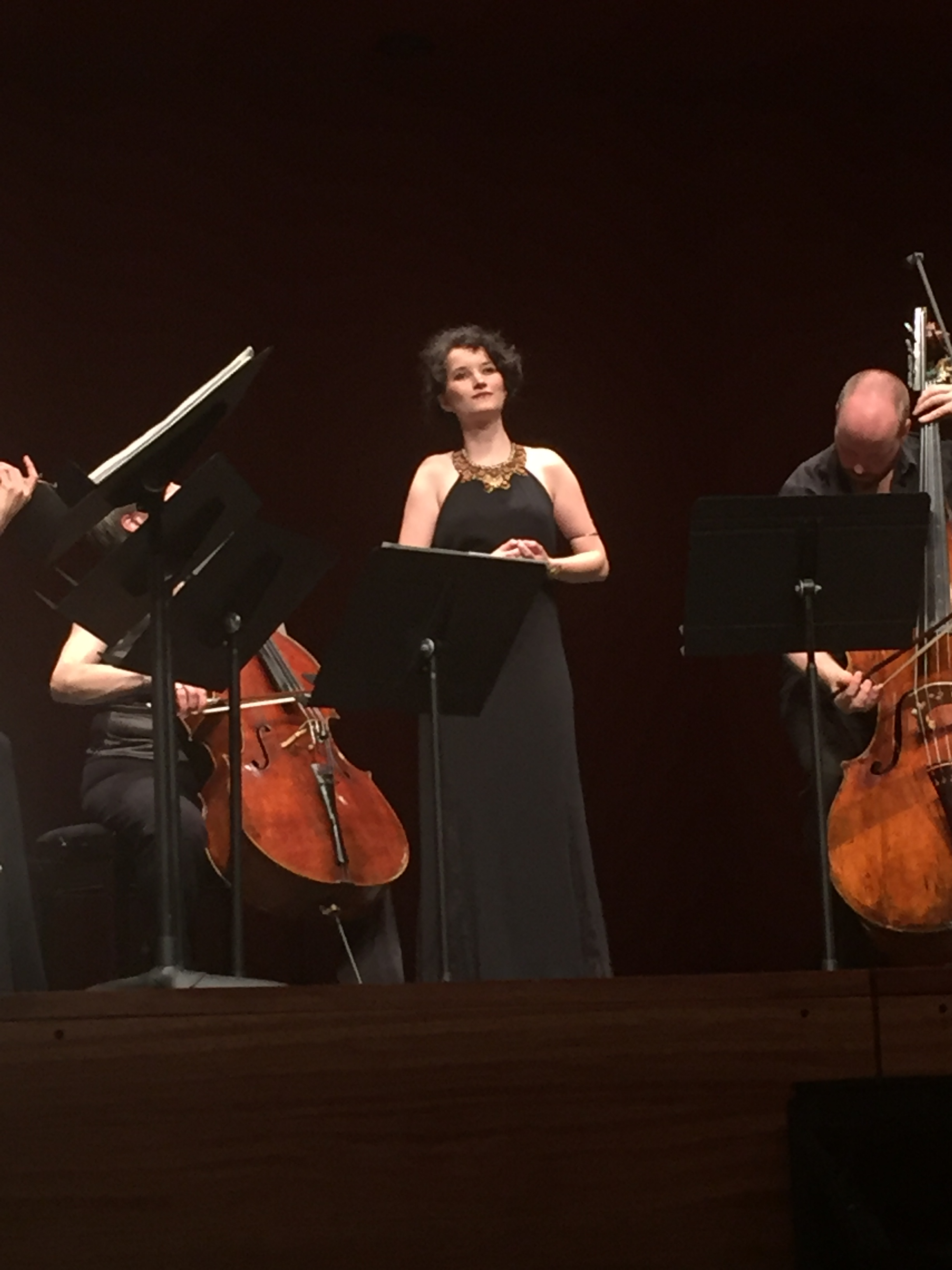 La soprano Anna Prohaska en un recital a l'Atlàntida de Vic. Maig-2016